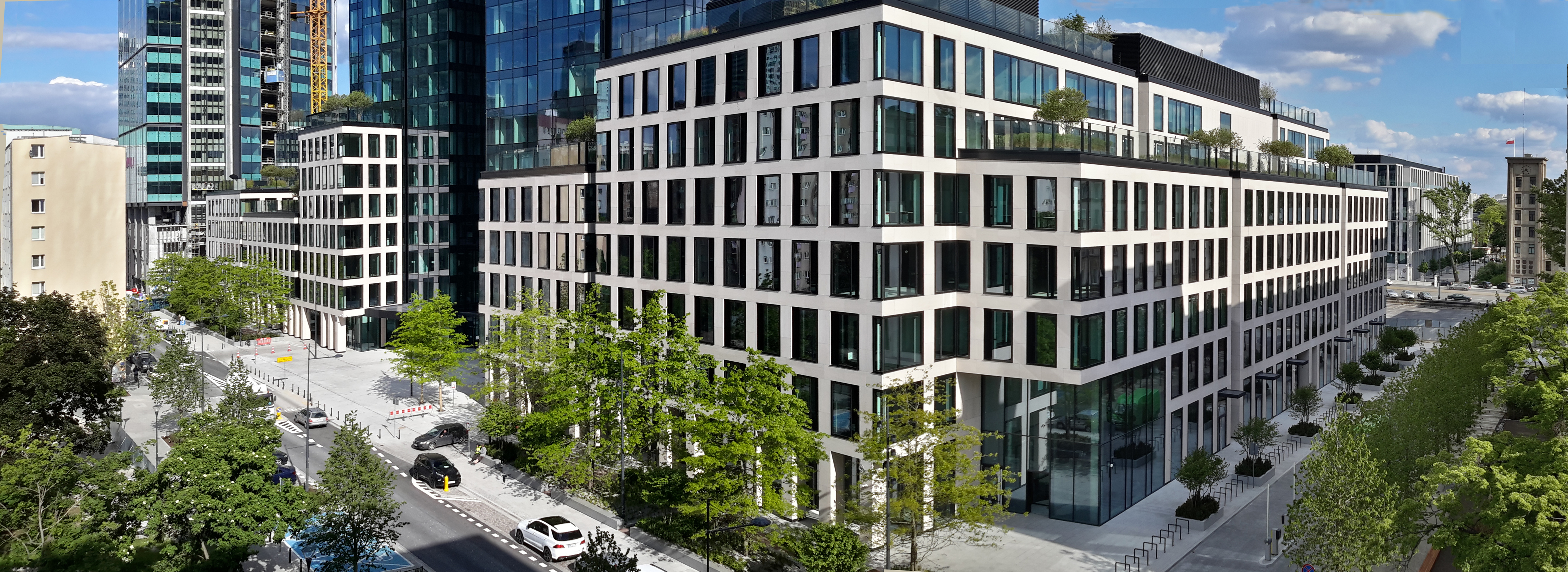 Ulica Chmielna w dniu 22 maja 2020